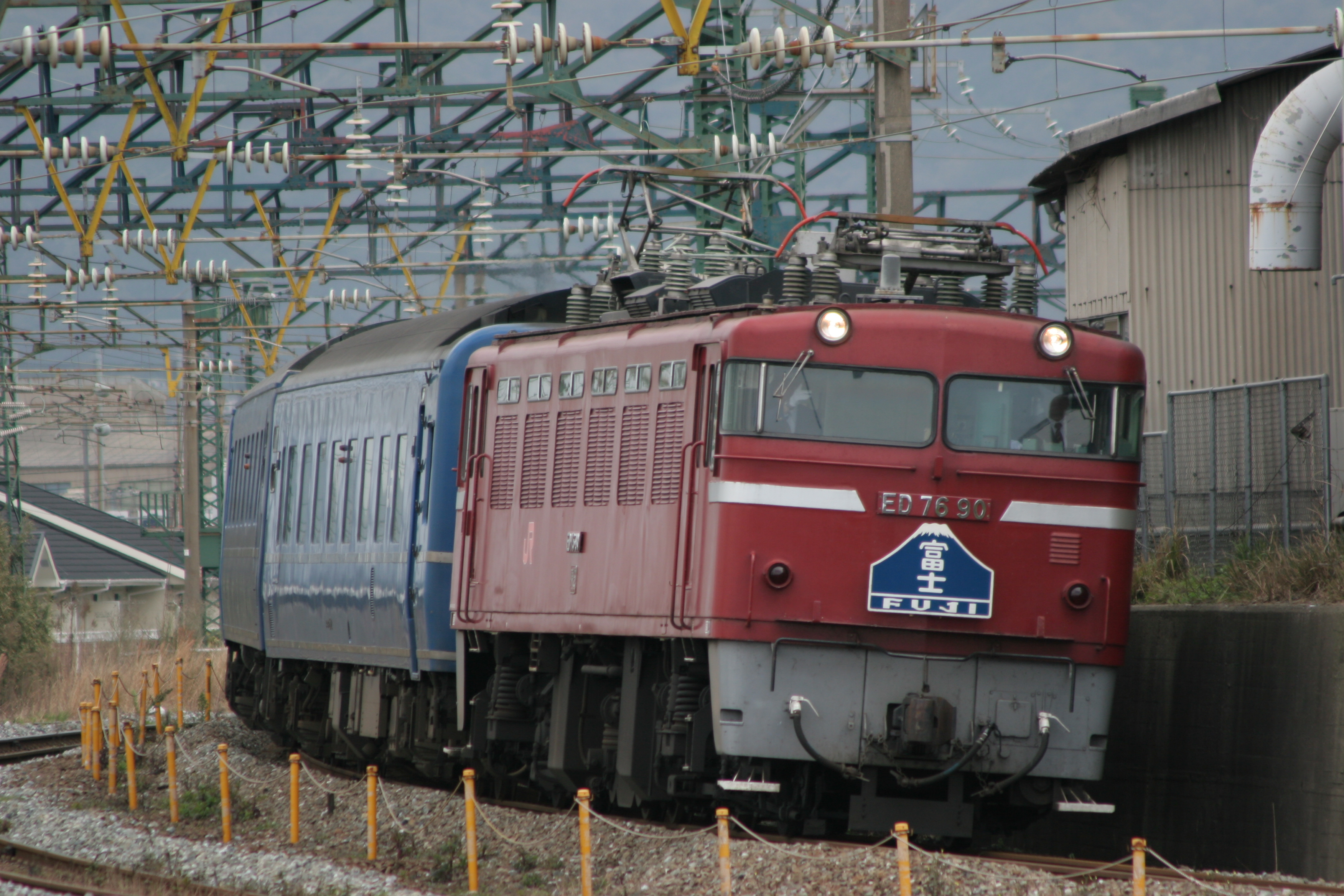 最終運転日の寝台特急富士・門司-小倉間